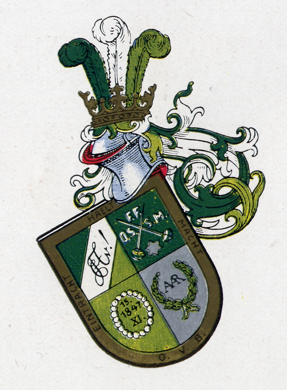 Studentenwappen des Corps Hercynia München